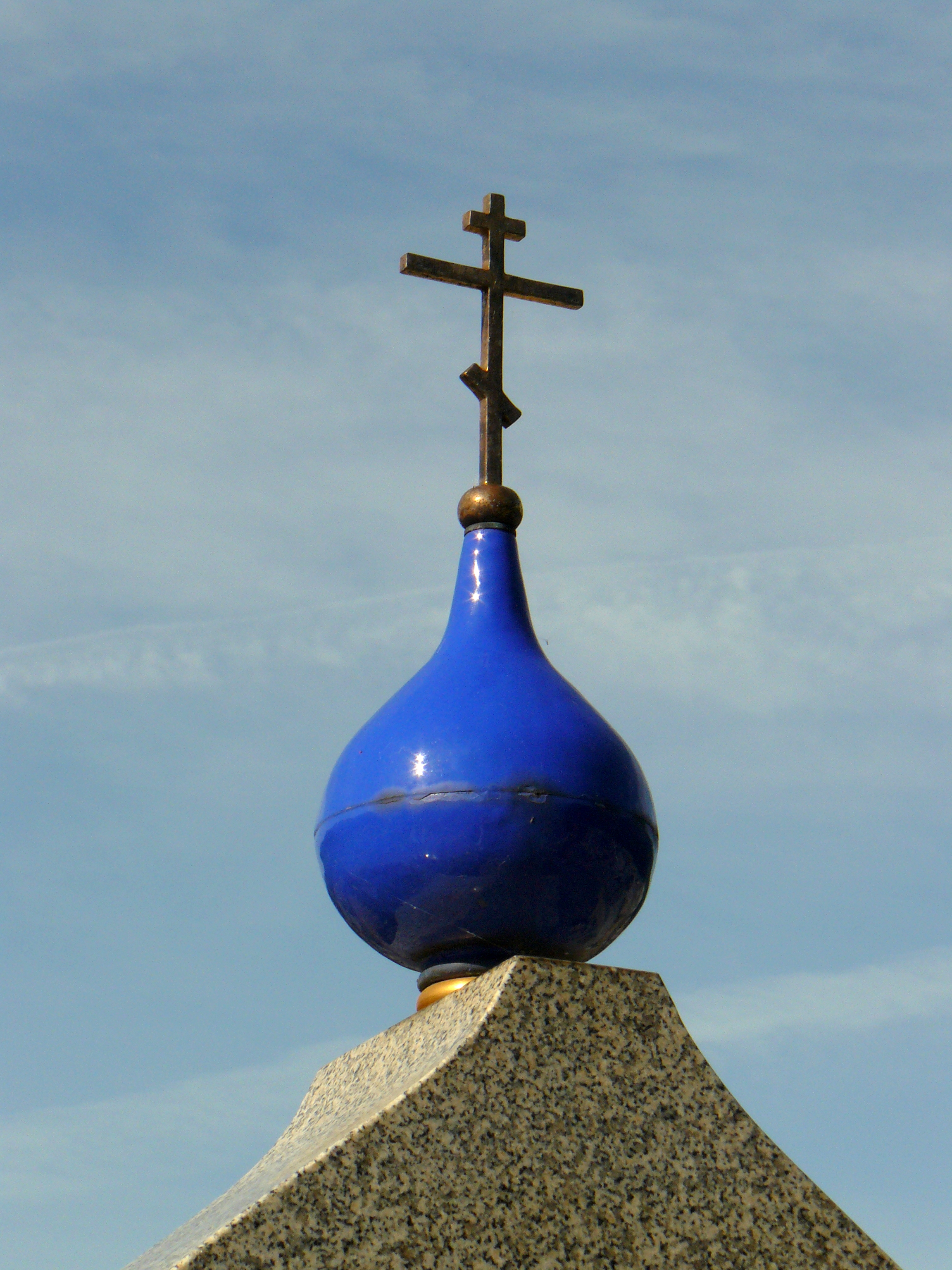 Croix orthodoxe sur une tombe du cimetière de Vélizy-Villacoublay (Yvelines, France)